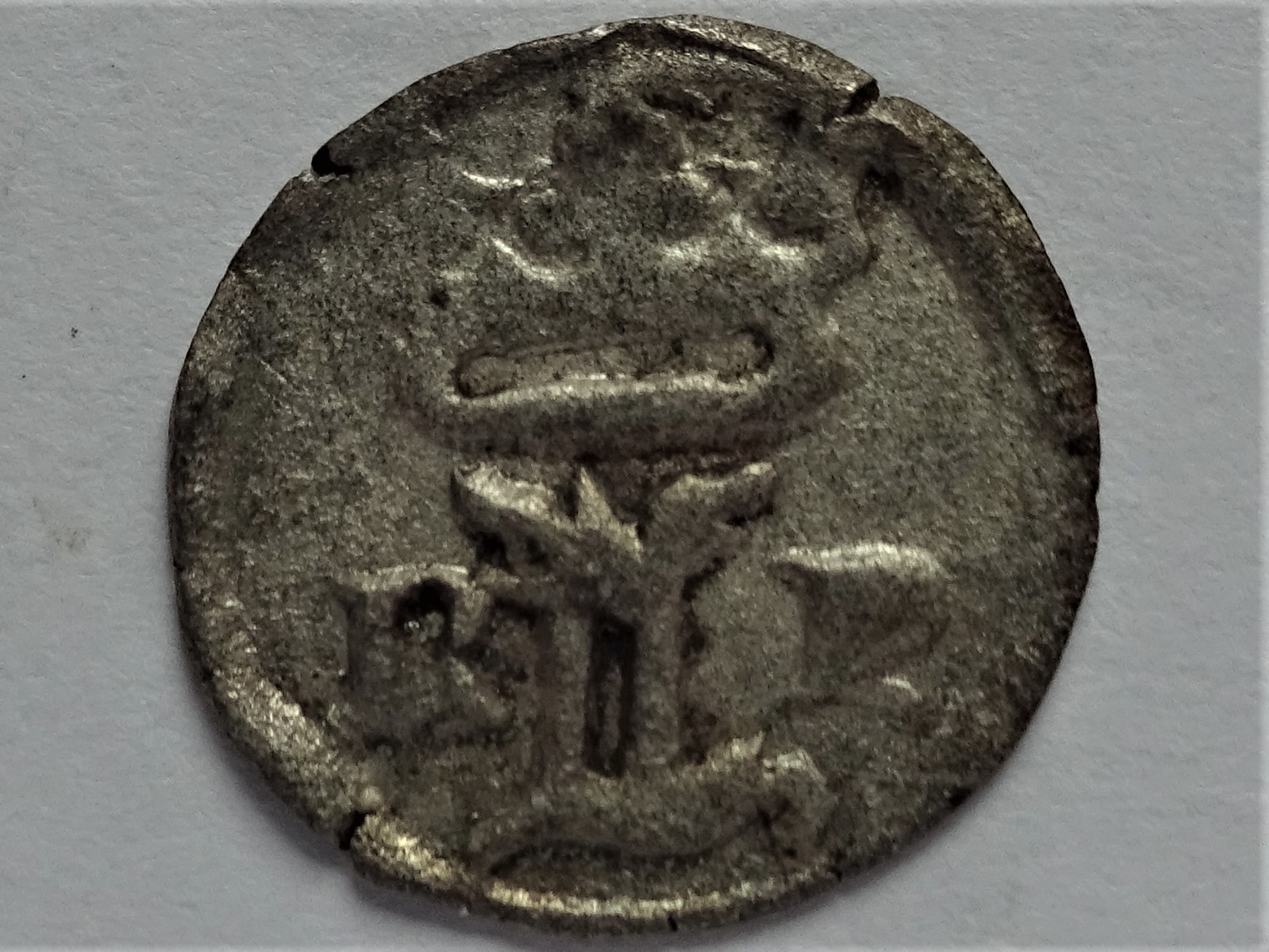 einseitiger sog. "Schwarzpfennig" (Böhmen) z.Zt. Ludwigs II. (1516-26)